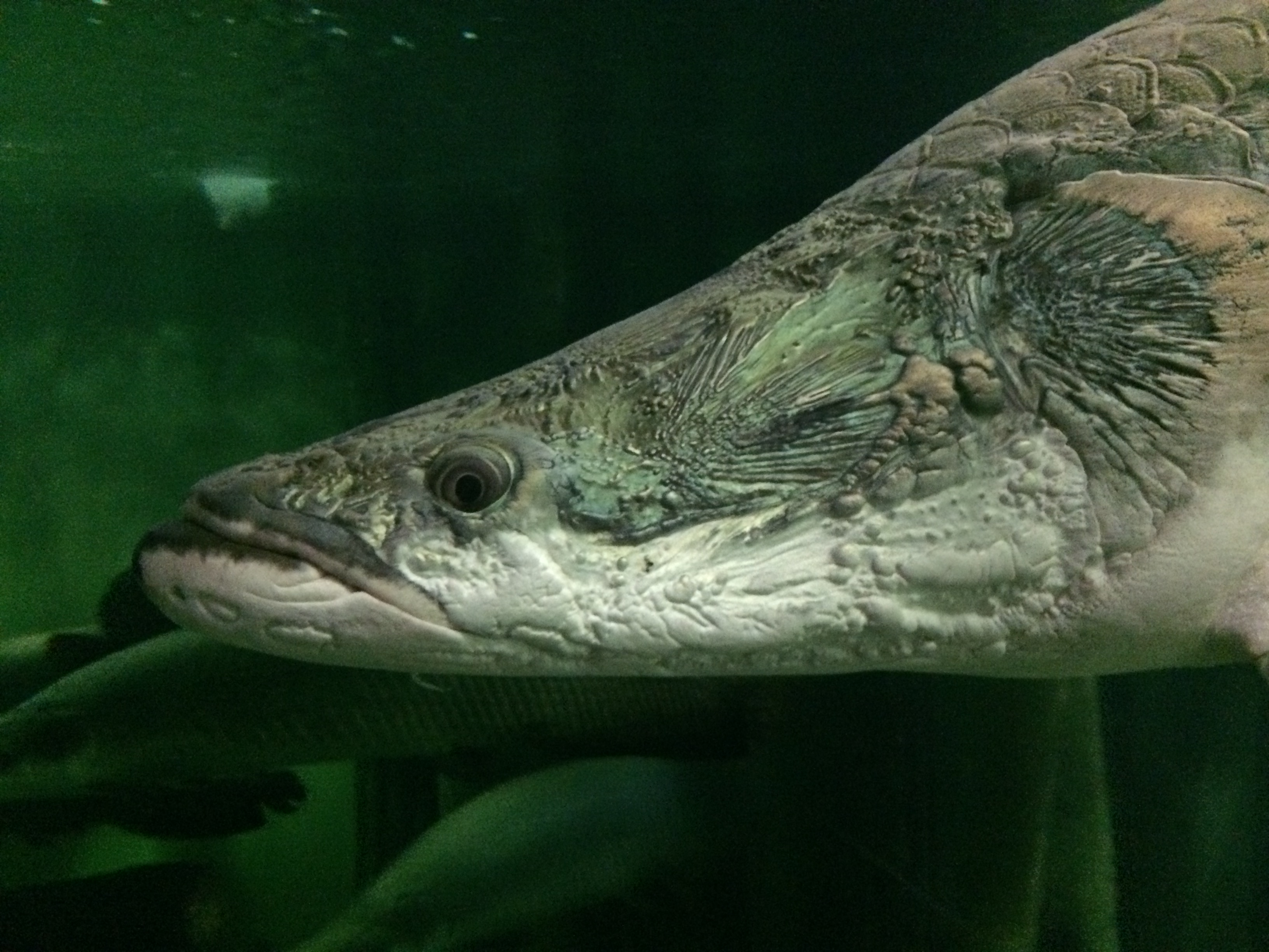 Arapaima at the Aquarium of Zaragoza (Spain)